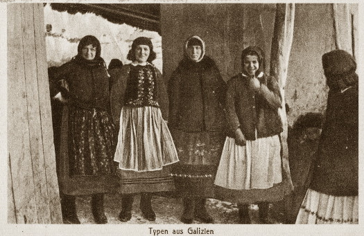 Galicja, old post card